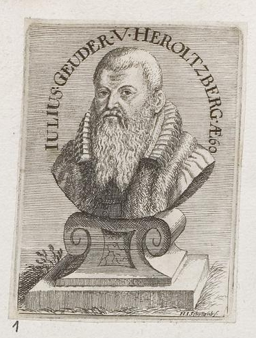 Julius Geuder von Heroldsberg (Kirchenpfleger in Nürnberg, Wirkungsdaten 1590–1594), im Alter von 60 Jahren. Grafik aus dem Klebeband Nr. 3 der Fürstlich Waldeckschen Hofbibliothek Arolsen. GND: 116601507